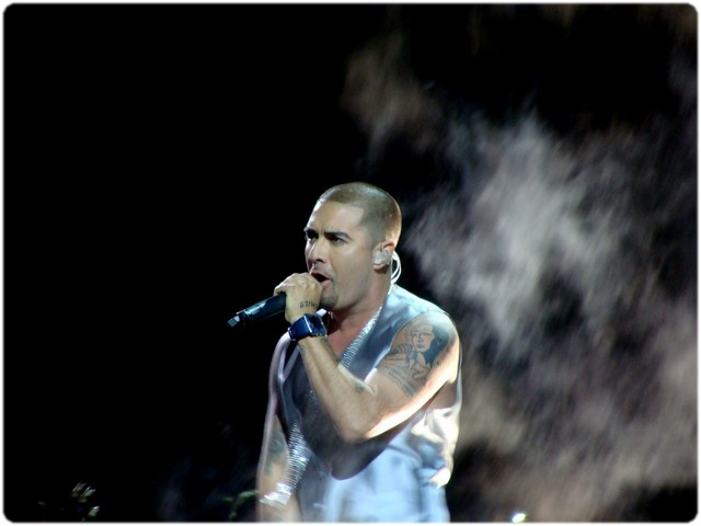 El grupo La Noche invita a subir al escenario a DJ Mendez en su presentación realizada en el Festival de Viña 2010